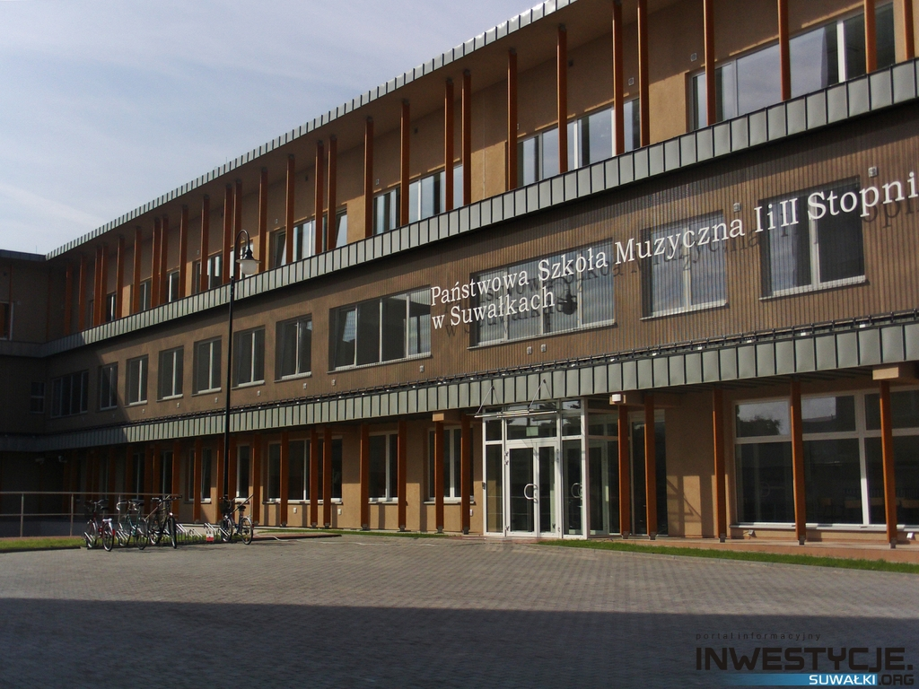 Państwowa Szkoła Muzyczna w Suwałkach po przebudowie w latach 2010-2012.